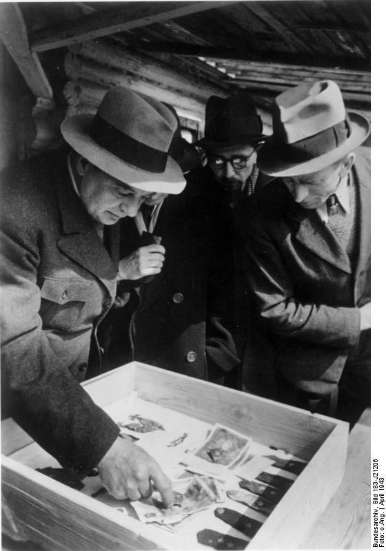 This description has been identified as biased or incorrect: Propaganda and lies.Zentralbild II. Weltkrieg 1939 - 45 Im April 1943 starten die deutschen Faschisten die antisowjetische Propaganda über den Massenmord im Katyner Wald, 15 klm nw. von Smolensk, wo sie Massengräber mit ca. 11 000 ermordeten kriegsgefangenen Polen als Greueltaten der Sowjets erklärten. ( Die Außerordentliche Staatliche Kommission unter Leitung des Akademikers Burdenko stellte in ihrem Untersuchungsbericht vom 24.01.1944 fest, dass die Ermordungen nicht wie die Faschisten behauptet hatten, im Frühjahr 1940 sondern erst im Herbst 1941, also von den Faschisten selbst, stattgefunden haben.) U. B. z: Mitglieder des polnischen Roten Kreuzes besichtigen die angeblich bei den Ermordeten gefundenen Besitztümer. April 1943 2023 - 43